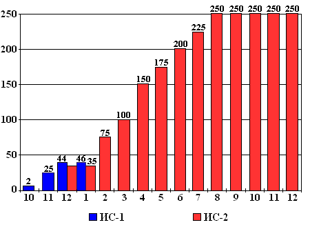 Любомир Таушанов, 2005 г.